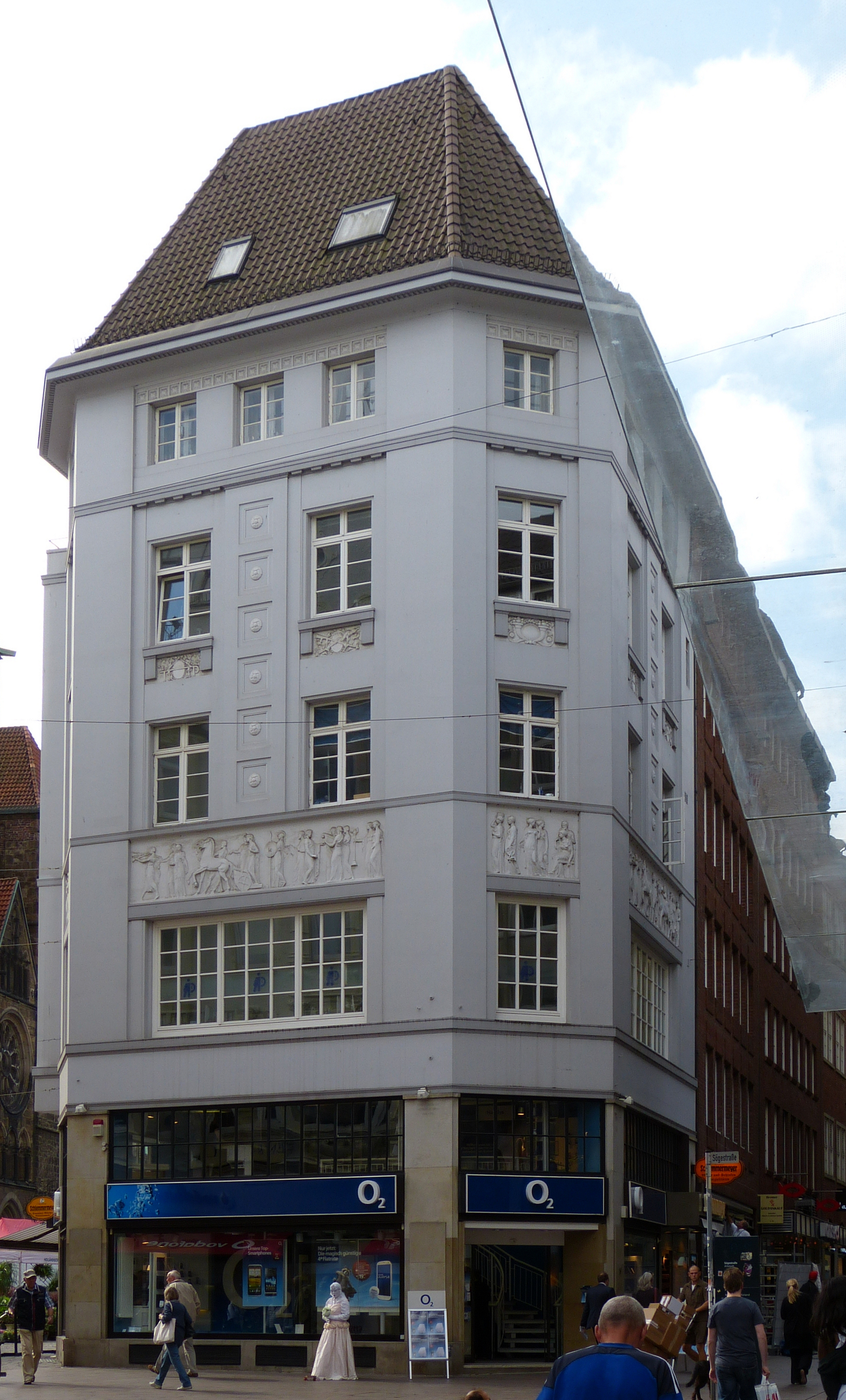 Geschäftshaus Herms in Bremen, Unser Lieben Frauen Kirchhof 17Das abgebildete Objekt ist ein geschütztes Kulturdenkmal in der Freien Hansestadt Bremen, mit der Nr. 1178 beim Landesamt für Denkmalpflege registriert.